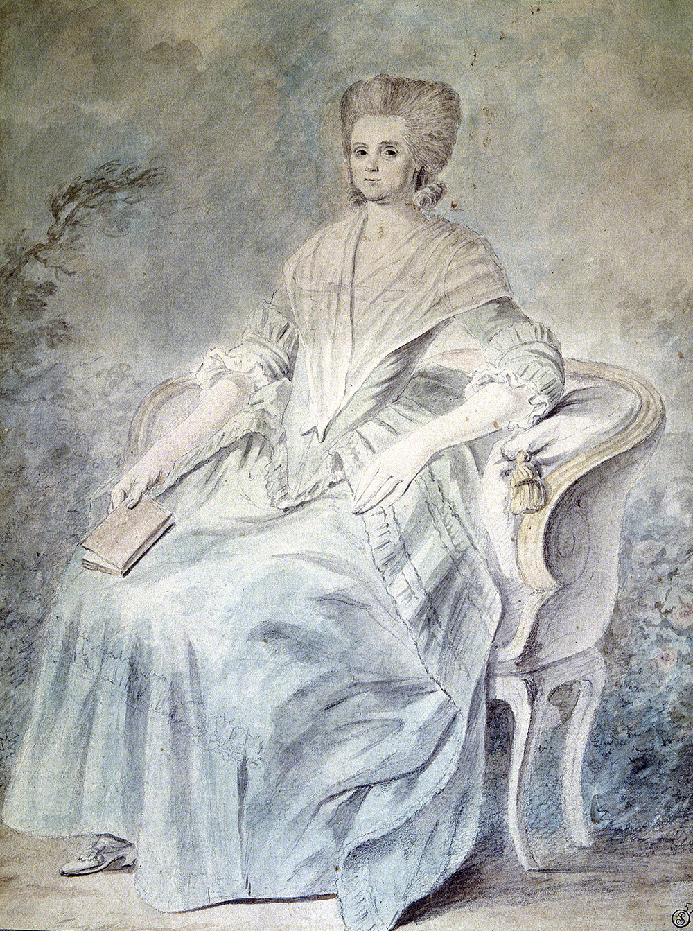 Olympe de Gouges assise sur un fauteuil Louis XV, tenant un livre de la main droite